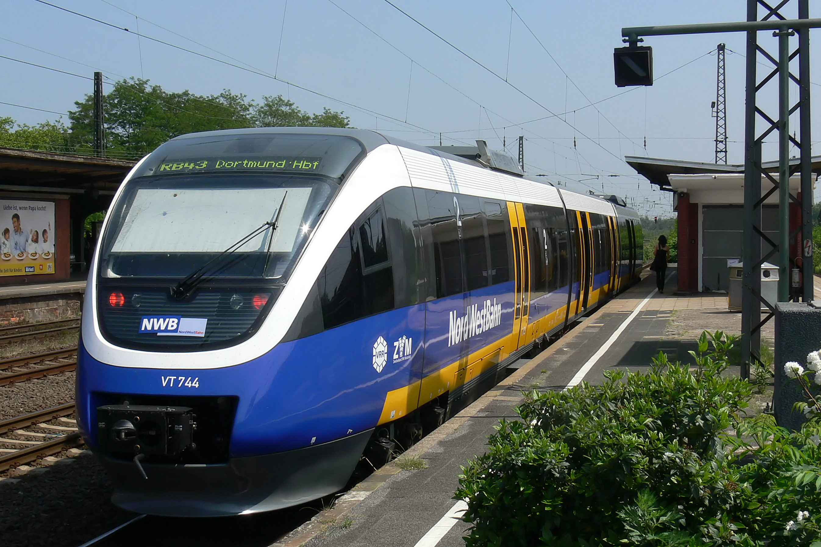 Bombardier Talent als VT 744 der NWB in Herne